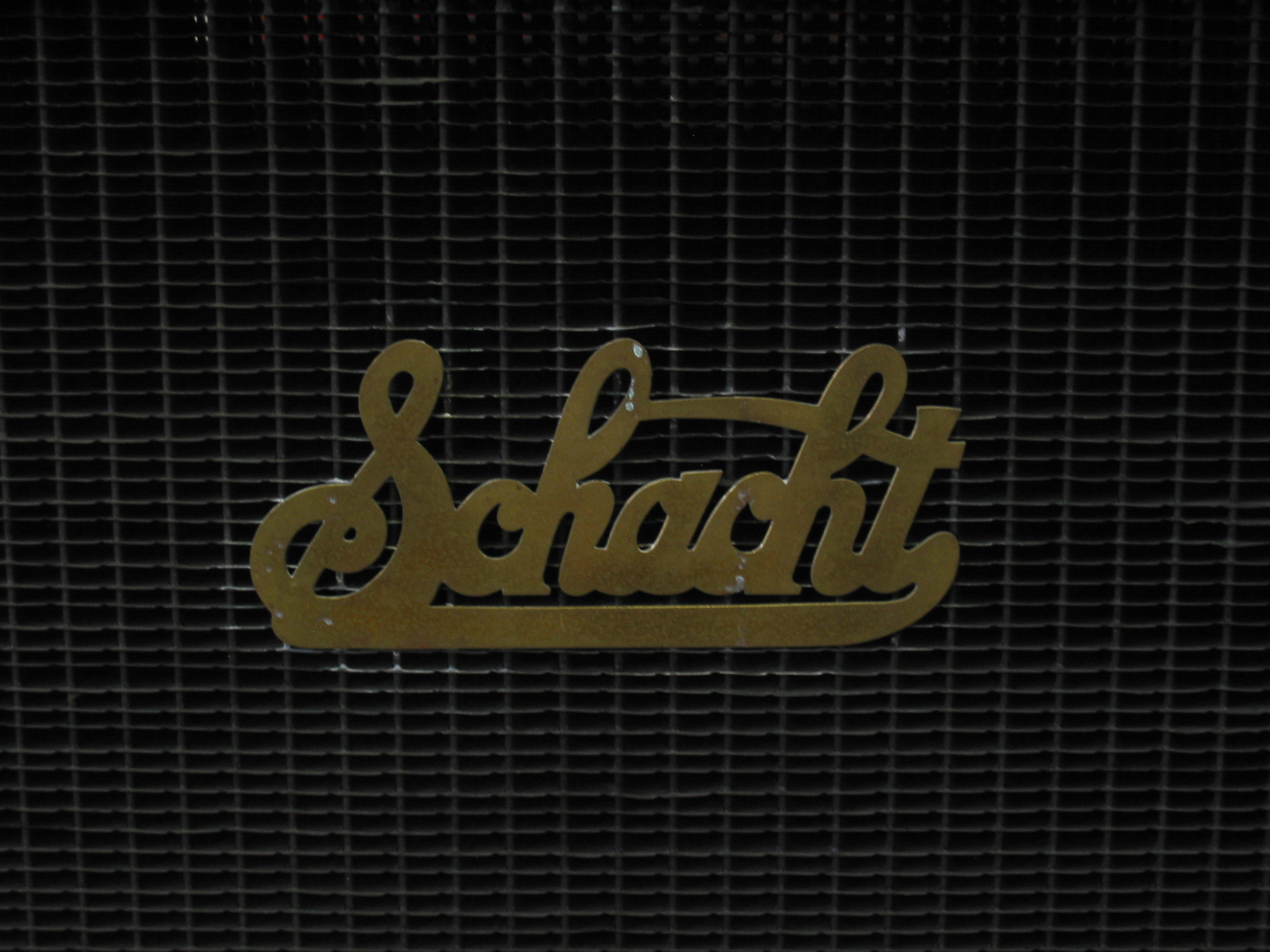 Emblem Schacht